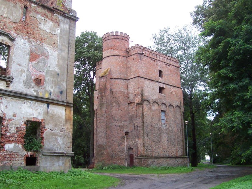 Zamek w Żmigrodzie